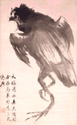 a konoha tengu 木の葉天狗